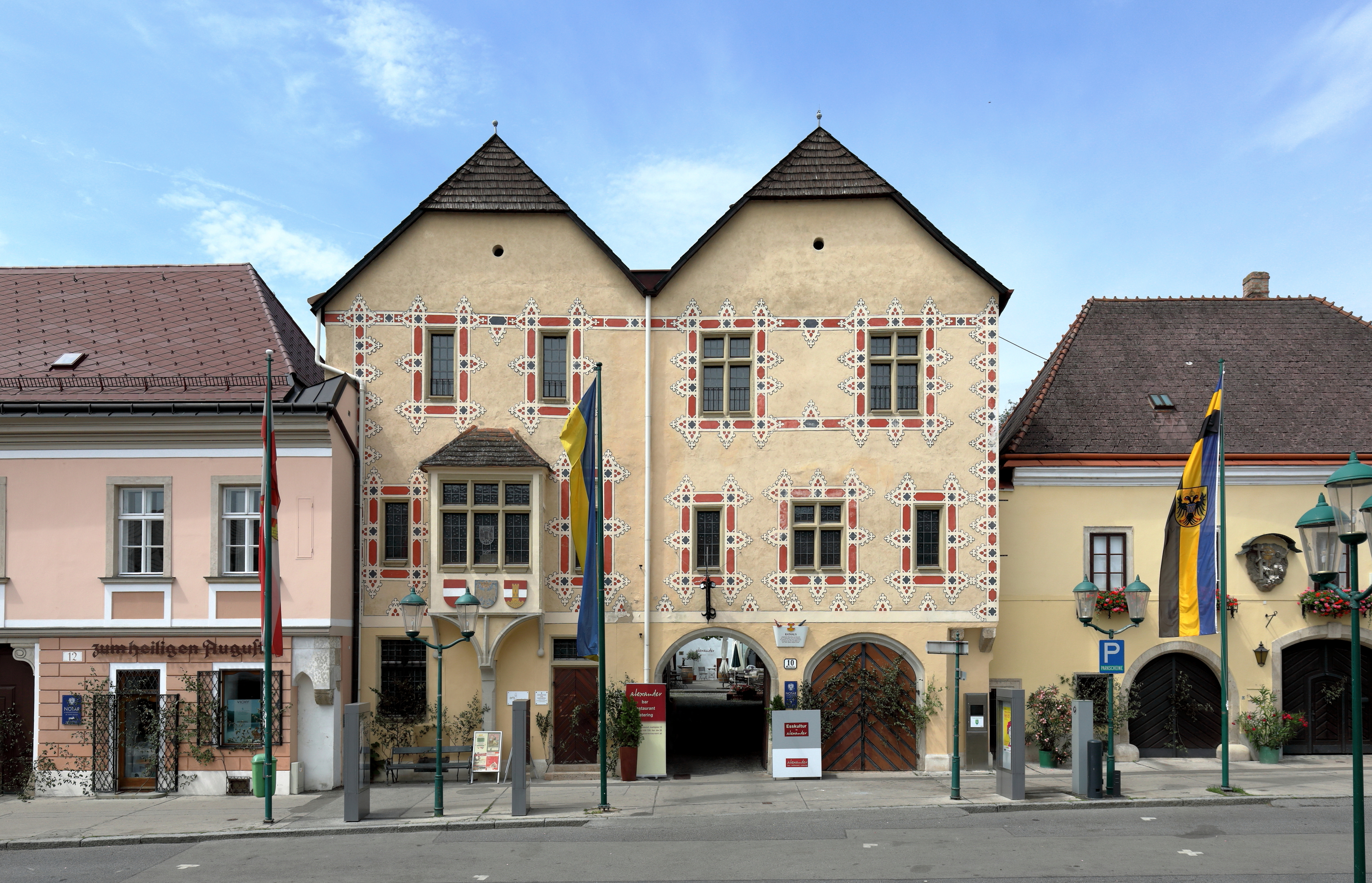 Das Rathaus am Marktplatz Nr. 10 in der niederösterreichischen Marktgemeinde Perchtoldsdorf.Der dreigeschossige Bau mit Doppelgiebelfassade und langgestreckten Hofflügeln wurde Mitte des 15. Jahrhunderts als Bürgerhaus errichtet und 1554 als Rathaus in Verwendung genommen. Die mit Seccomalerei (rekonstruiert) geschmückte Fassade stammt aus dem Jahr 1526. Es ist neben dem Wagnerhaus (Marktplatz 23) das einzige Haus im Ort, das auch äußerlich seinen gotischen - in diesem Fall spätgotischen - Charakter bewahrt hat.